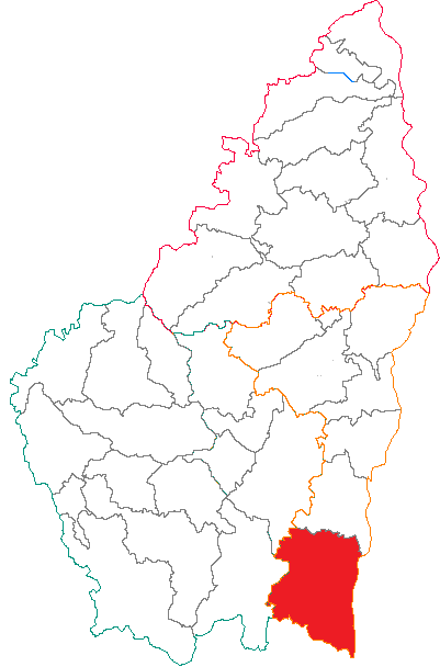 Situation du canton dans le département de l'Ardèche (France)